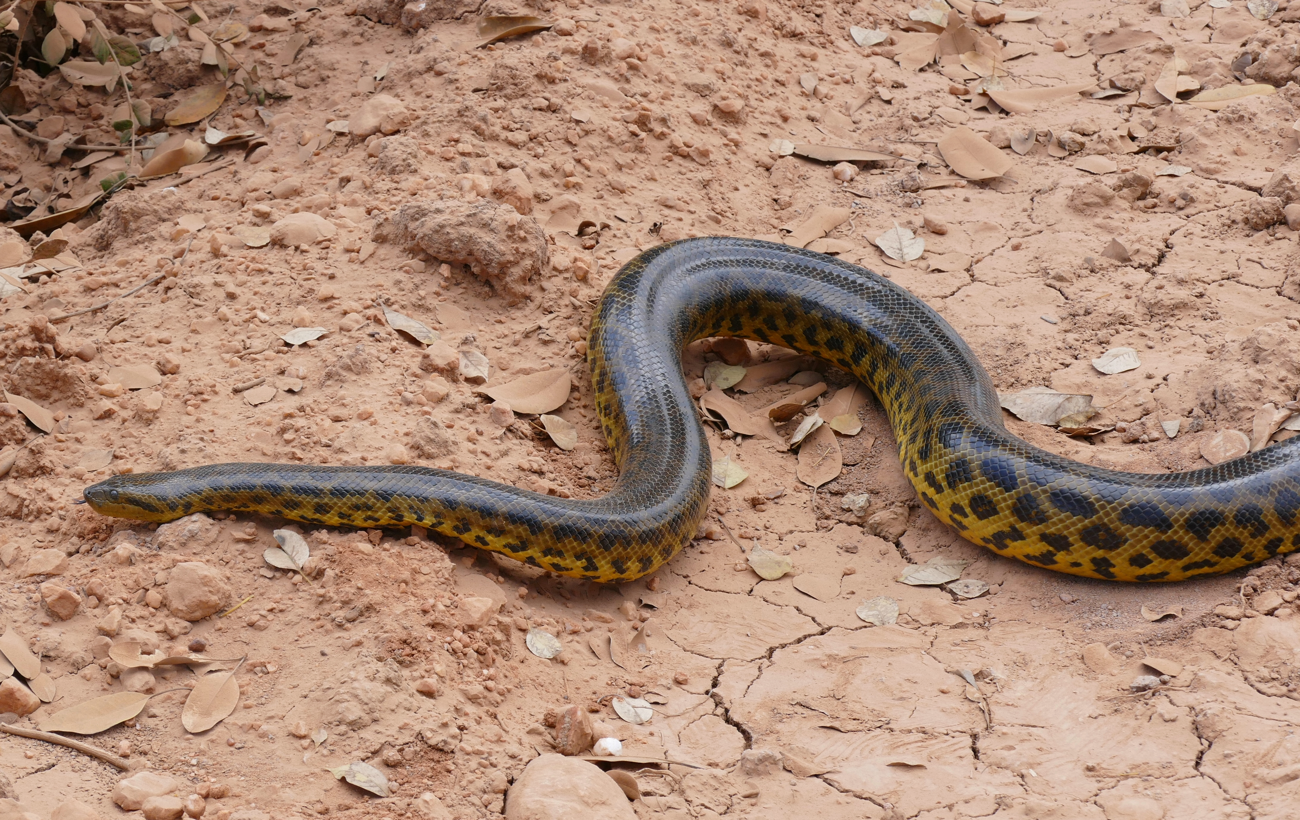 Transpantaneira, Poconé, Mato Grosso, BRAZIL